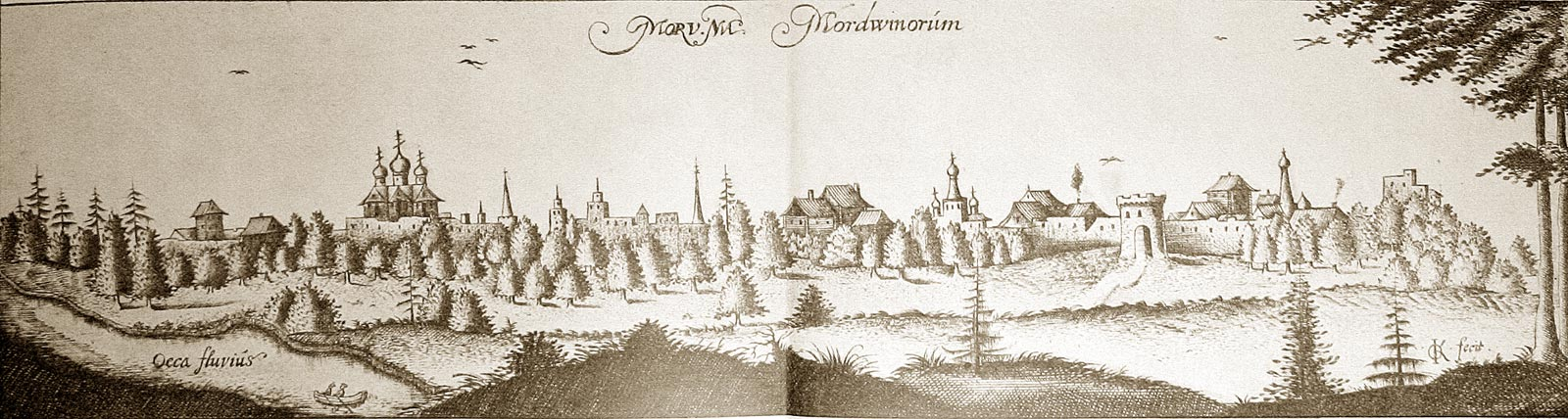 Муром